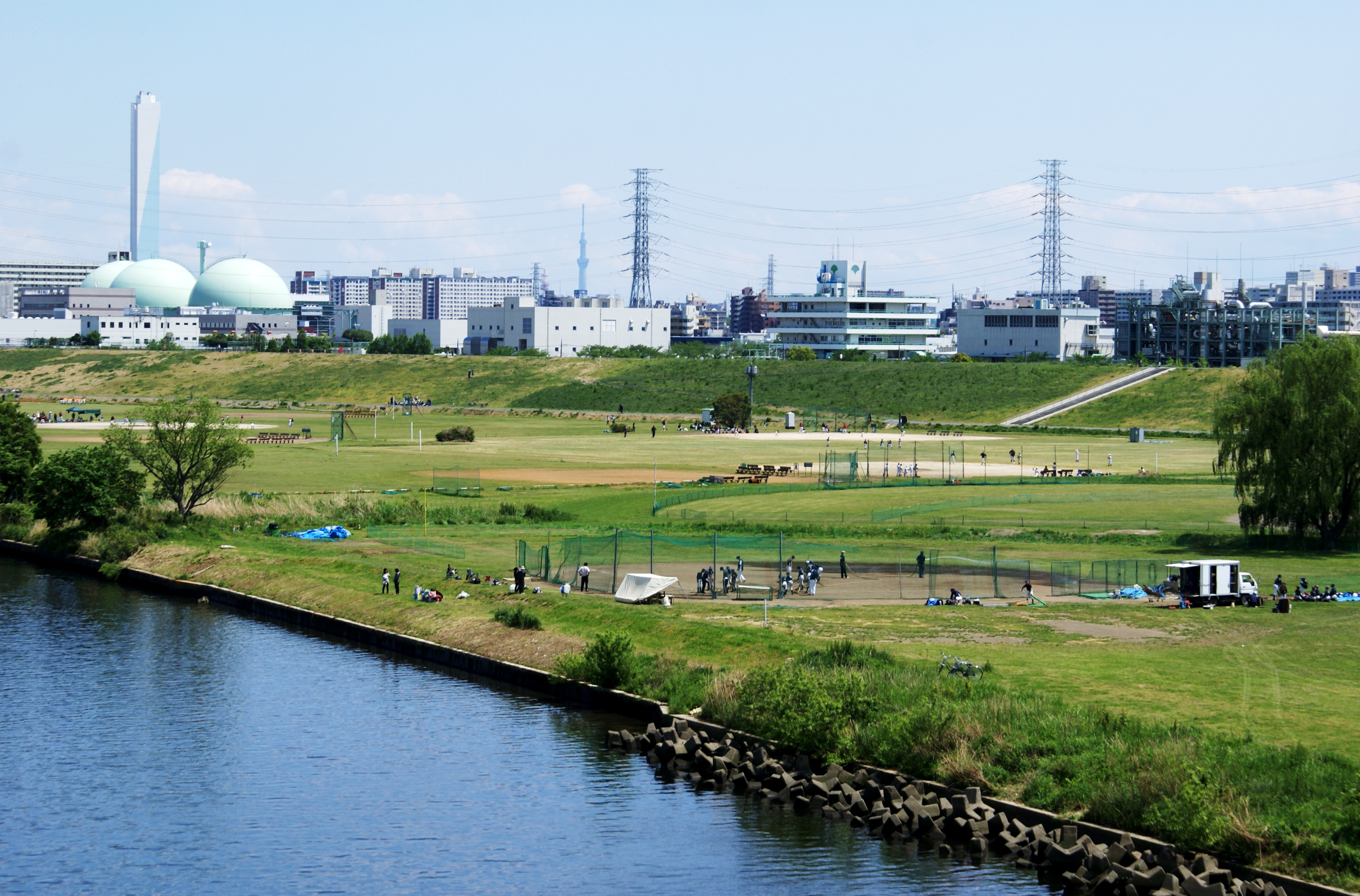 荒川戸田橋緑地（東京スカイツリー遠望）